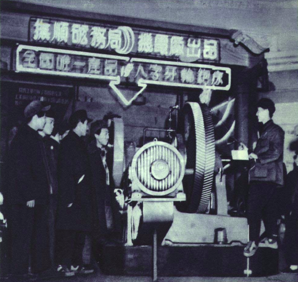 1952年抚顺矿务局